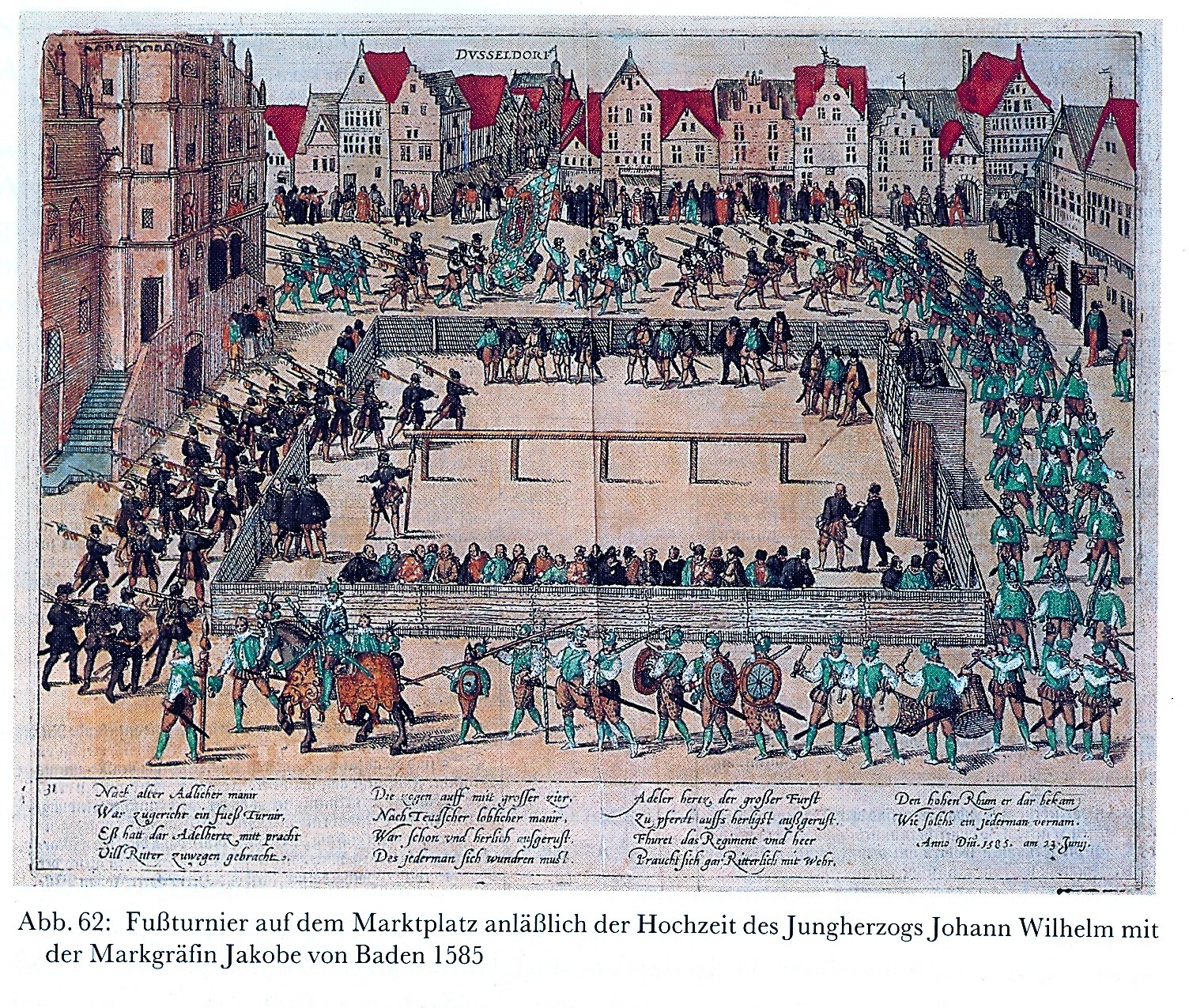 Düsseldorf Marktplatz im Jahre 1585 aus "Fußturnier auf dem Marktplatz", 1585, Kupferstich von Franz Hogenburg in D.Graminäus "Beschreibung derer Fuerstlich Gueligscher Horczeit ...", Köln 1587.jpg